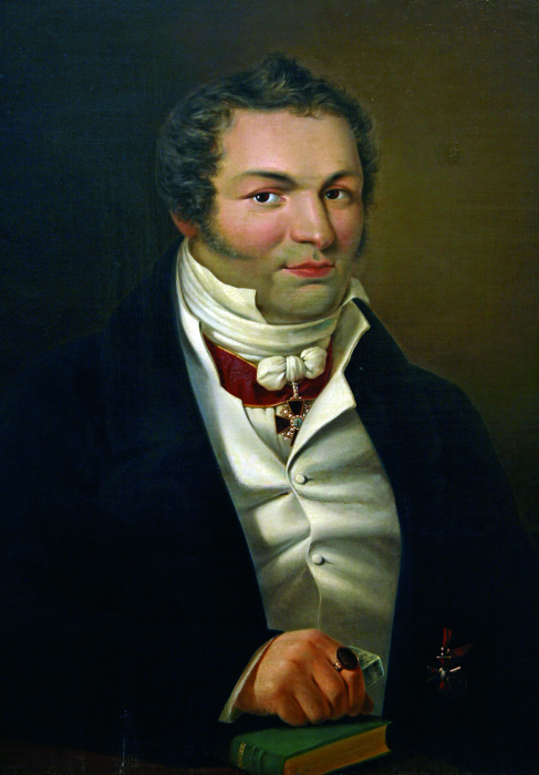 Муродров Матвей Яковлевич (1776-1831) русский врач